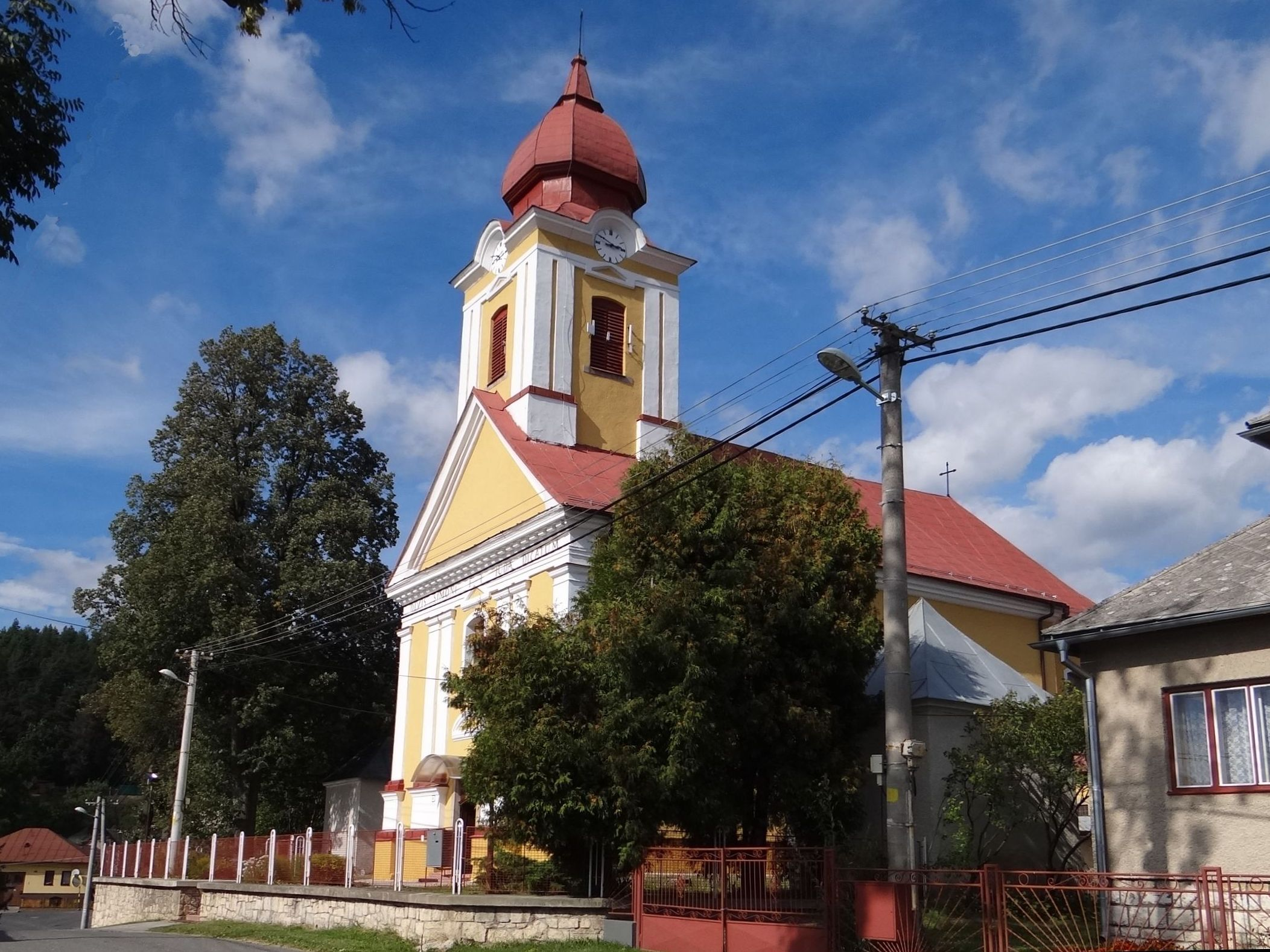 Vydrník: Kostol sv. Šimona a Júdu